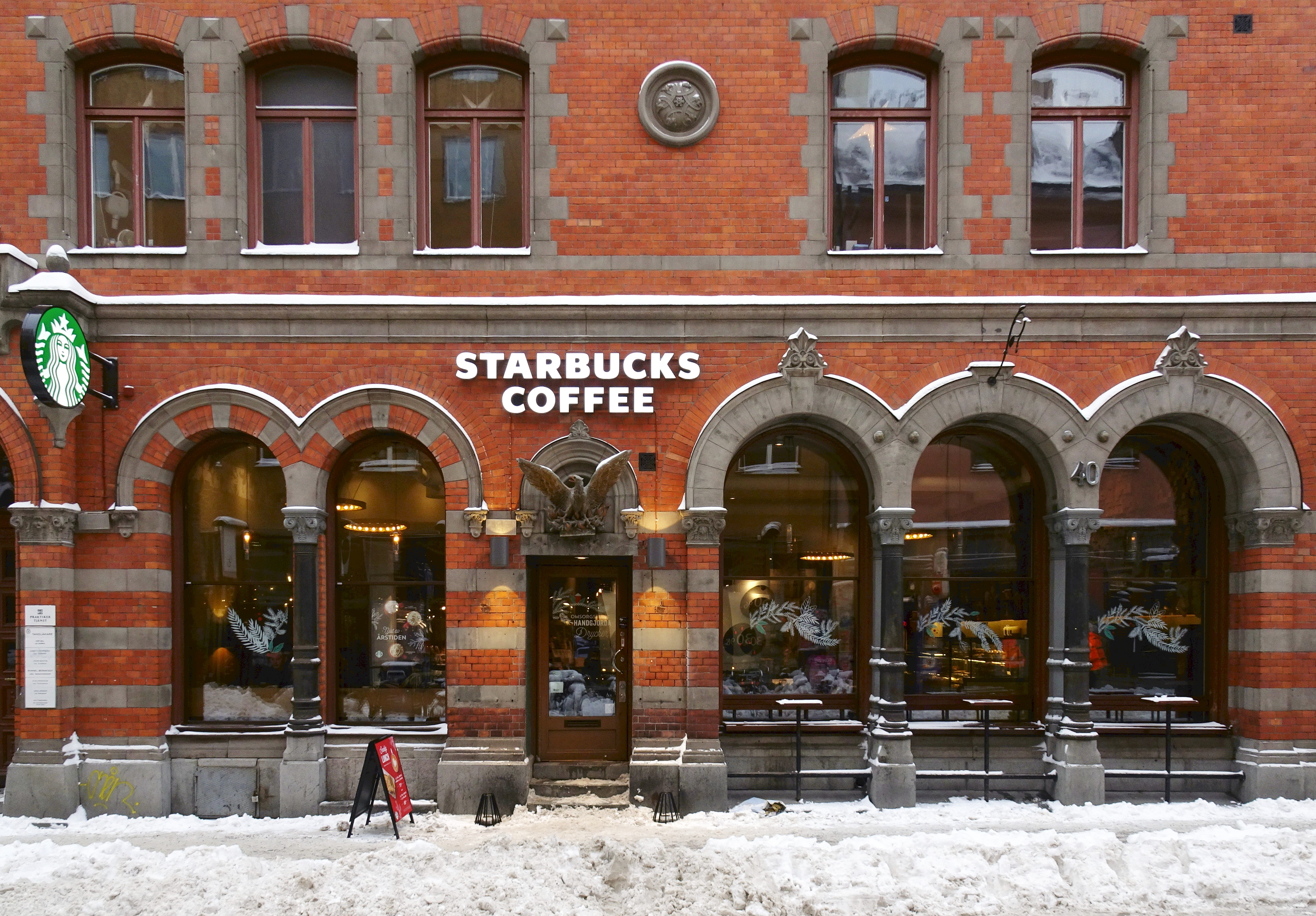 Fastigheten Västergötland 20, Götgatan 40, f.d. Apoteket Fenix, nuvarande Starbucks Coffee